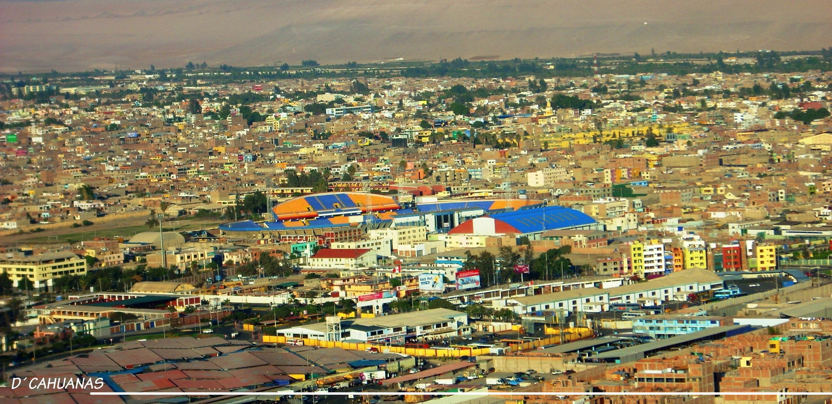 Panoramica del estadio de tacna